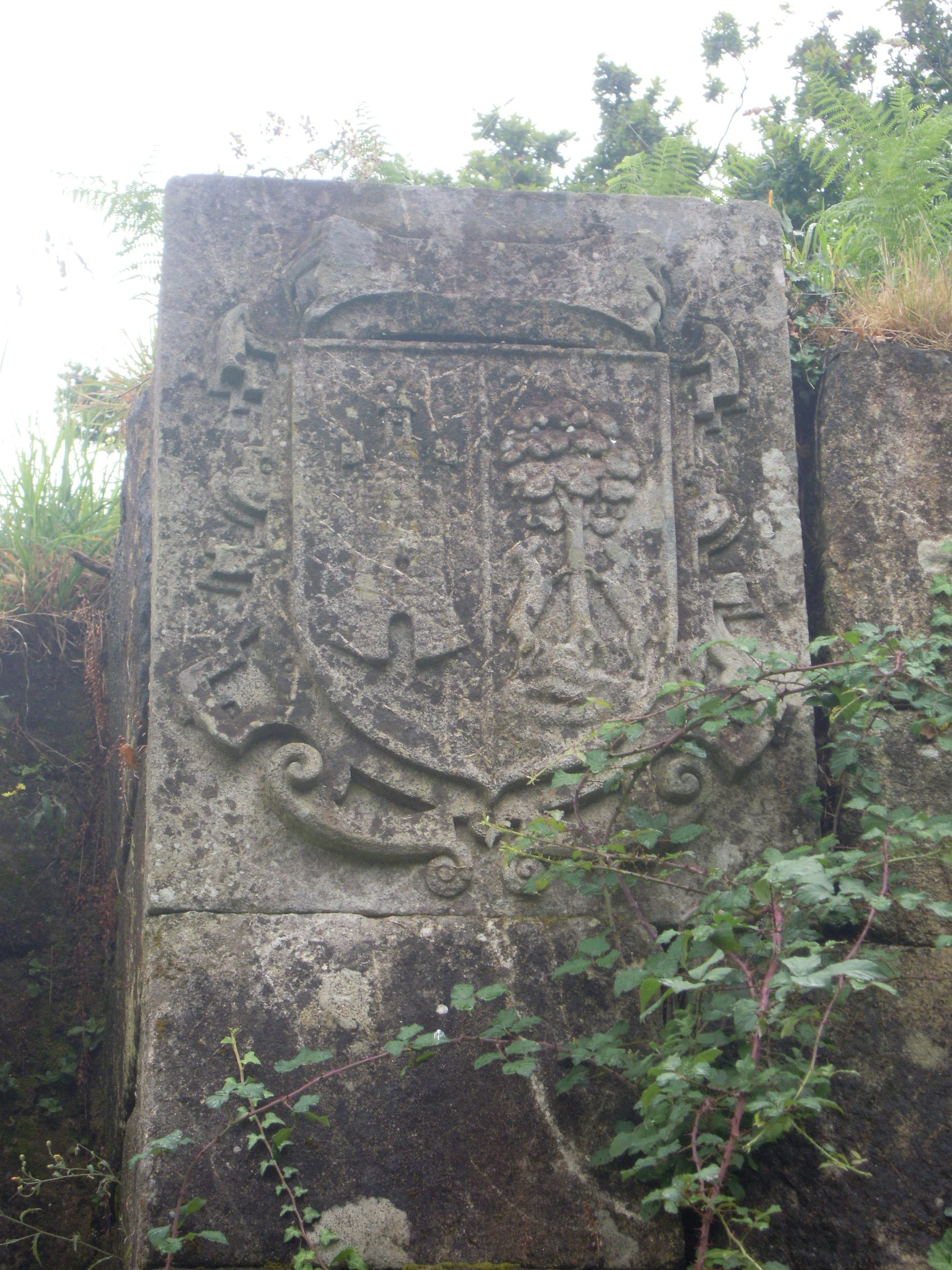 Escudo na entrada do Forte de San Lourenzo, en Goián (Tomiño)